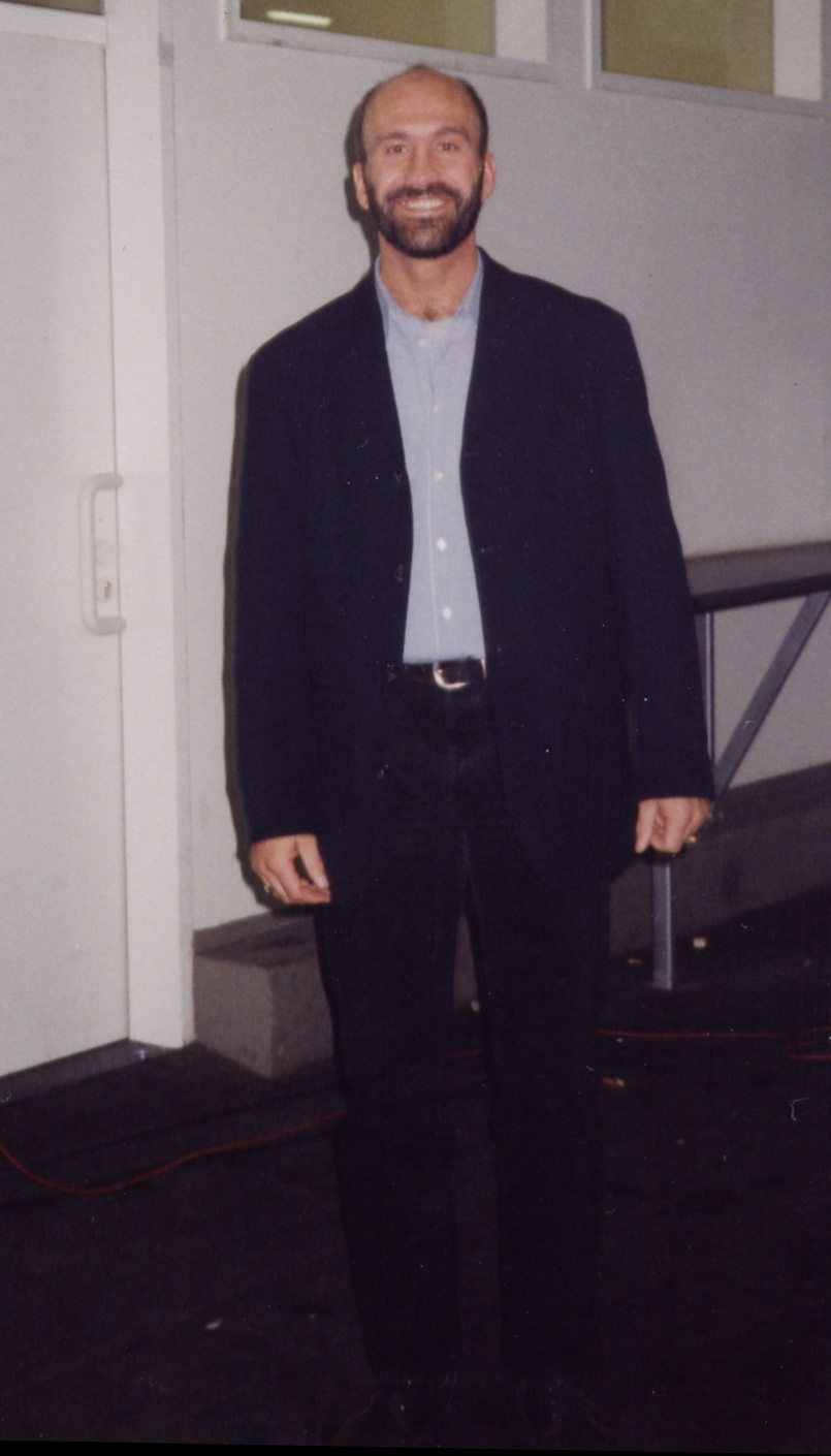 ehemaliger Eishockeyspieler und Eishockeykommentator Rick Amann Source: self taken by David Herrmann, 1997 in Berlin